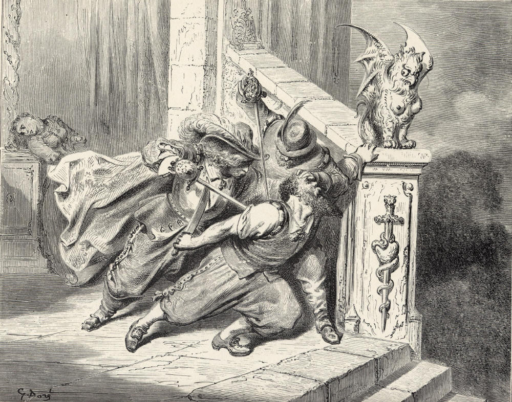 Illustration for Charles Perrault's La Barbe Bleue from Histoires ou Contes du Temps passé: Les Contes de ma Mère l'Oye (1697). Gustave Doré's illustrations appear in an 1867 edition entitled Les Contes de Perrault. Fourth of four engravings